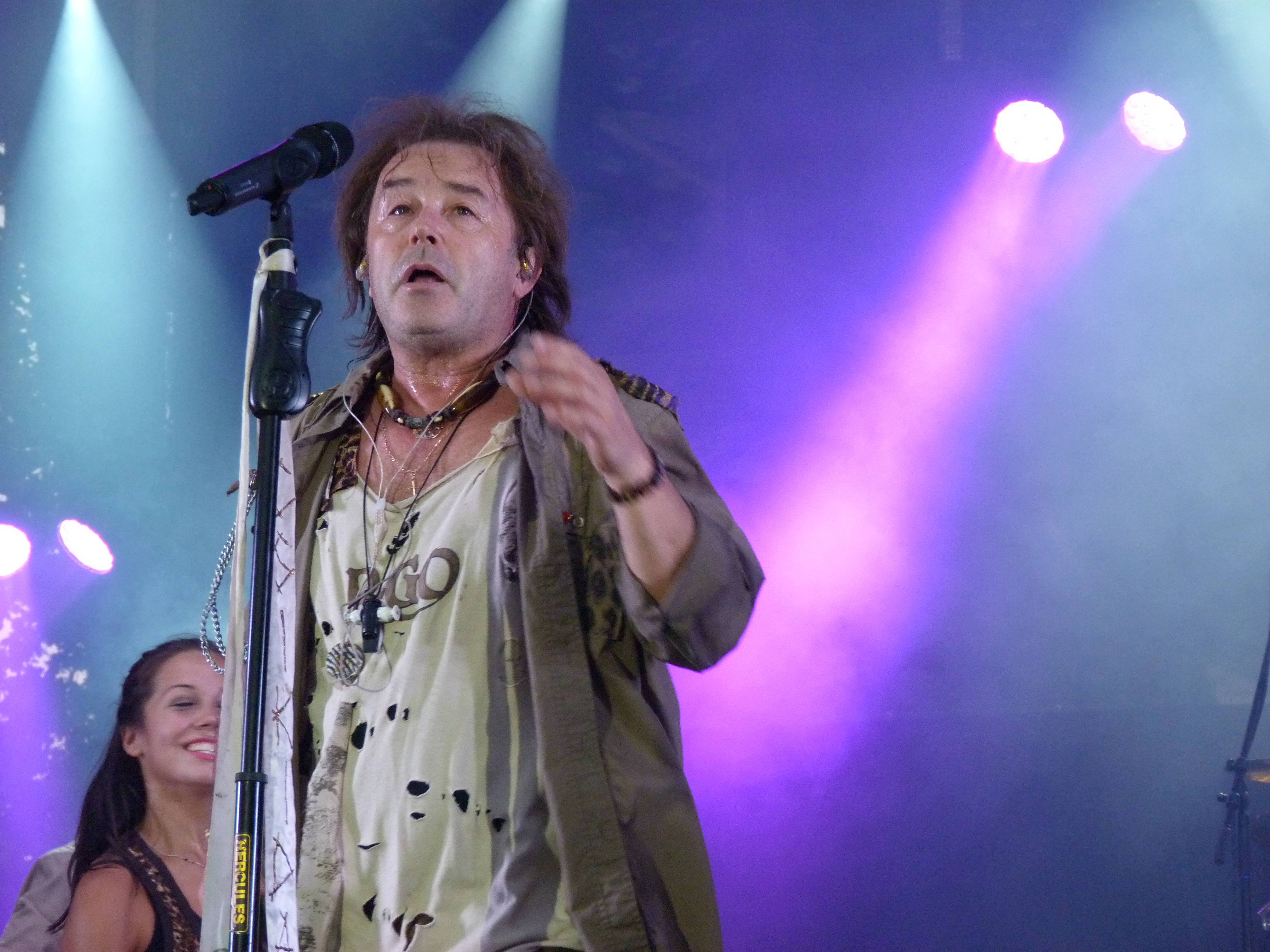 A felvétel 2014. augusztus 29-én pénteken készült Budapesten, a Lánchíd utcában. Lánchíd utca utcabál. R-GO, Szikora Róbert. ©© Derzsi Elekes Andor, Budapest 2014, You are authorised to use these photos and vids under Creative Commons – even for commercial, for profit purposes. Photos must be attributed to Derzsi Elekes Andor. All of the photos and vids in the Metapolisz DVD line are under Creative Commons and can be used even for commercial – for profit – purposes. Recommended Citation Derzsi Elekes Andor: Metapolisz DVD line